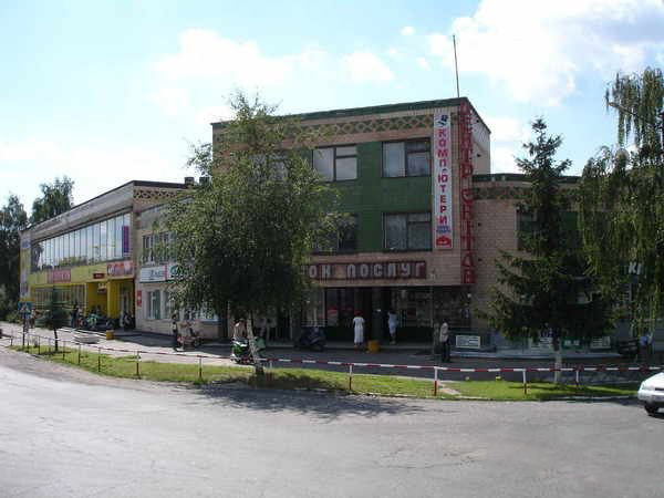 Центр Нових Санжар, Полтавська обл